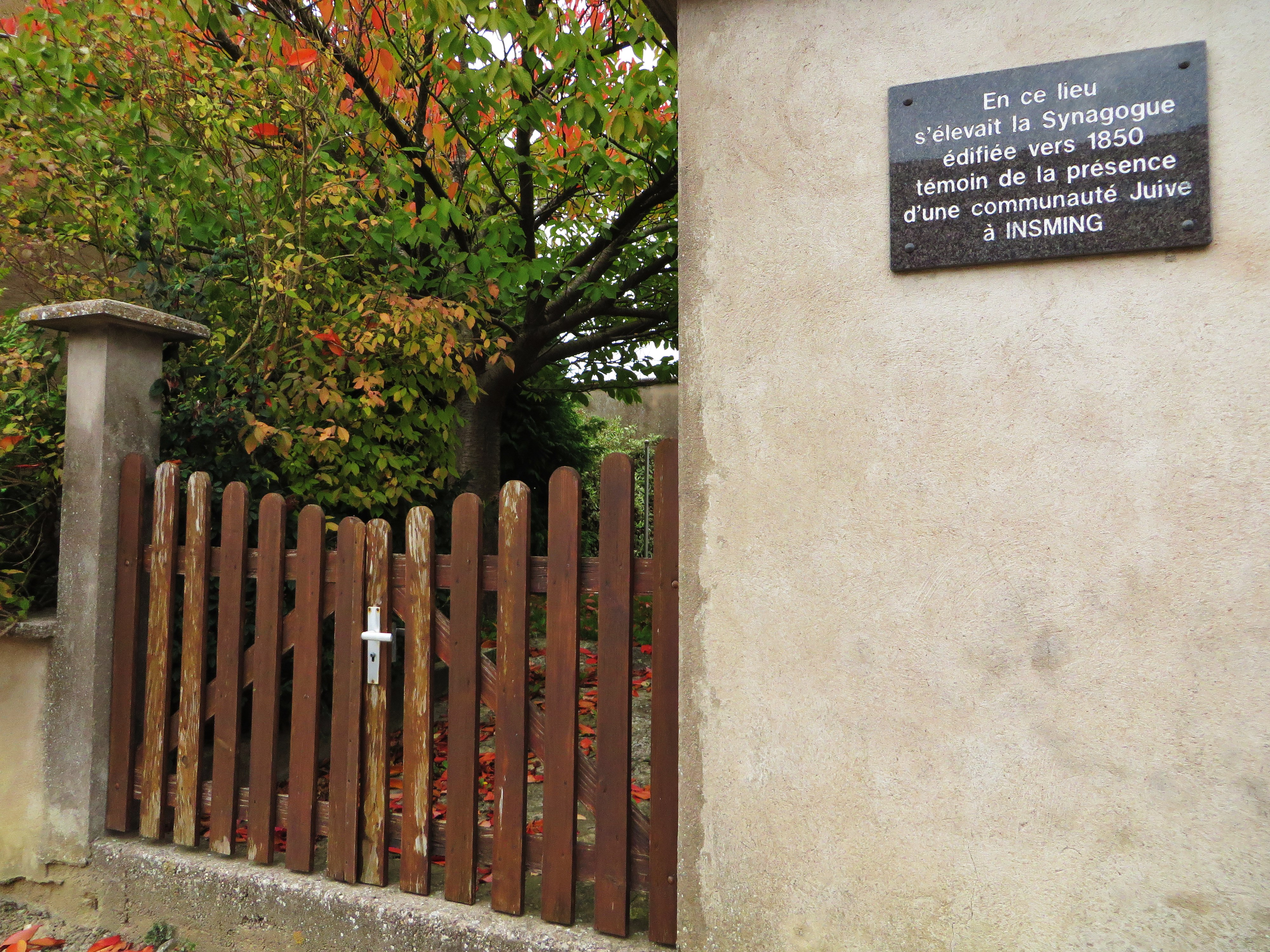 Insming plaque synagogue